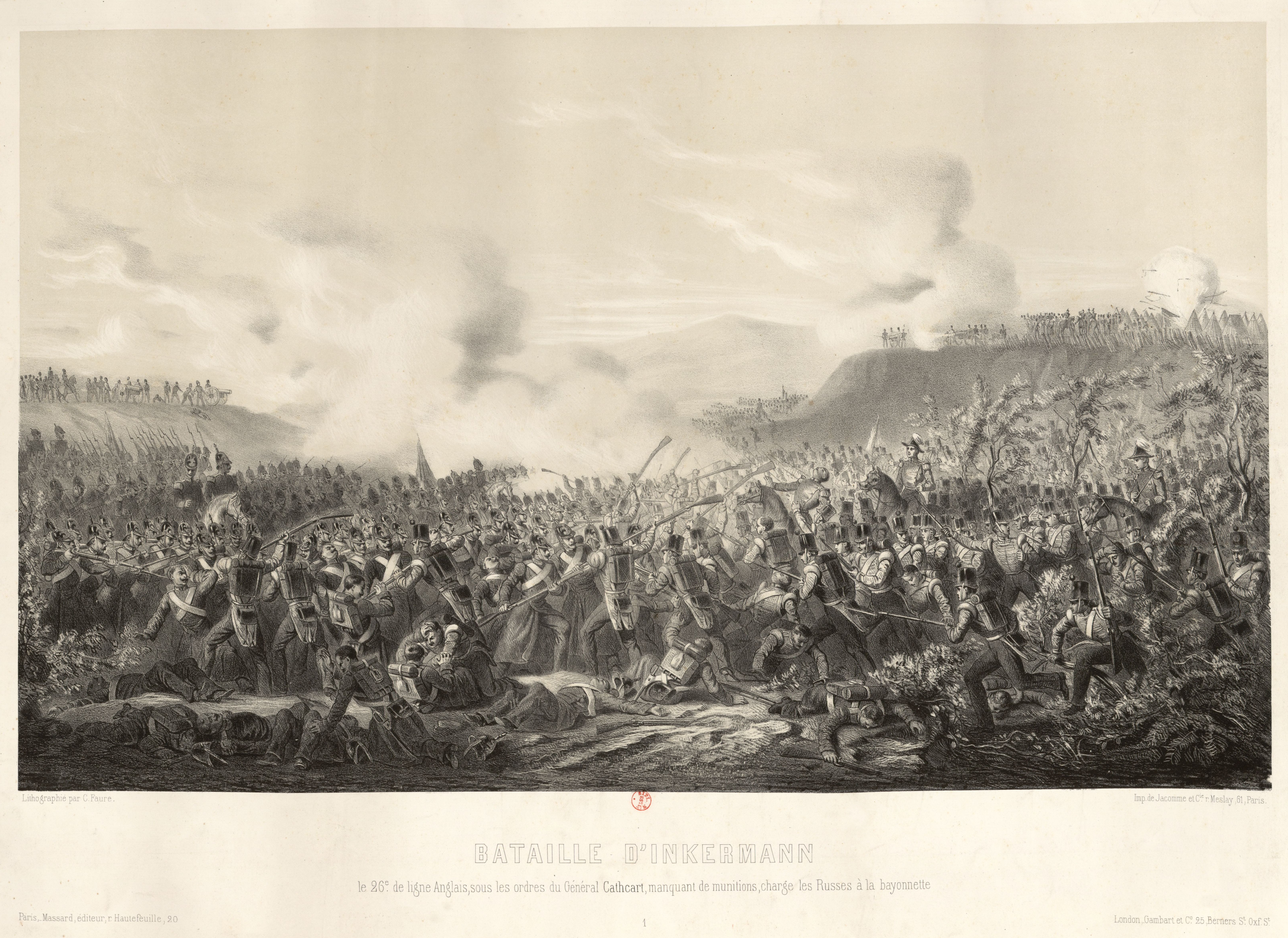 Bataille d'Inkerman - Le 26e de ligne anglais sous les ordres du général Cathcart, manquant de munitions, charge les Russes à la baïonnette